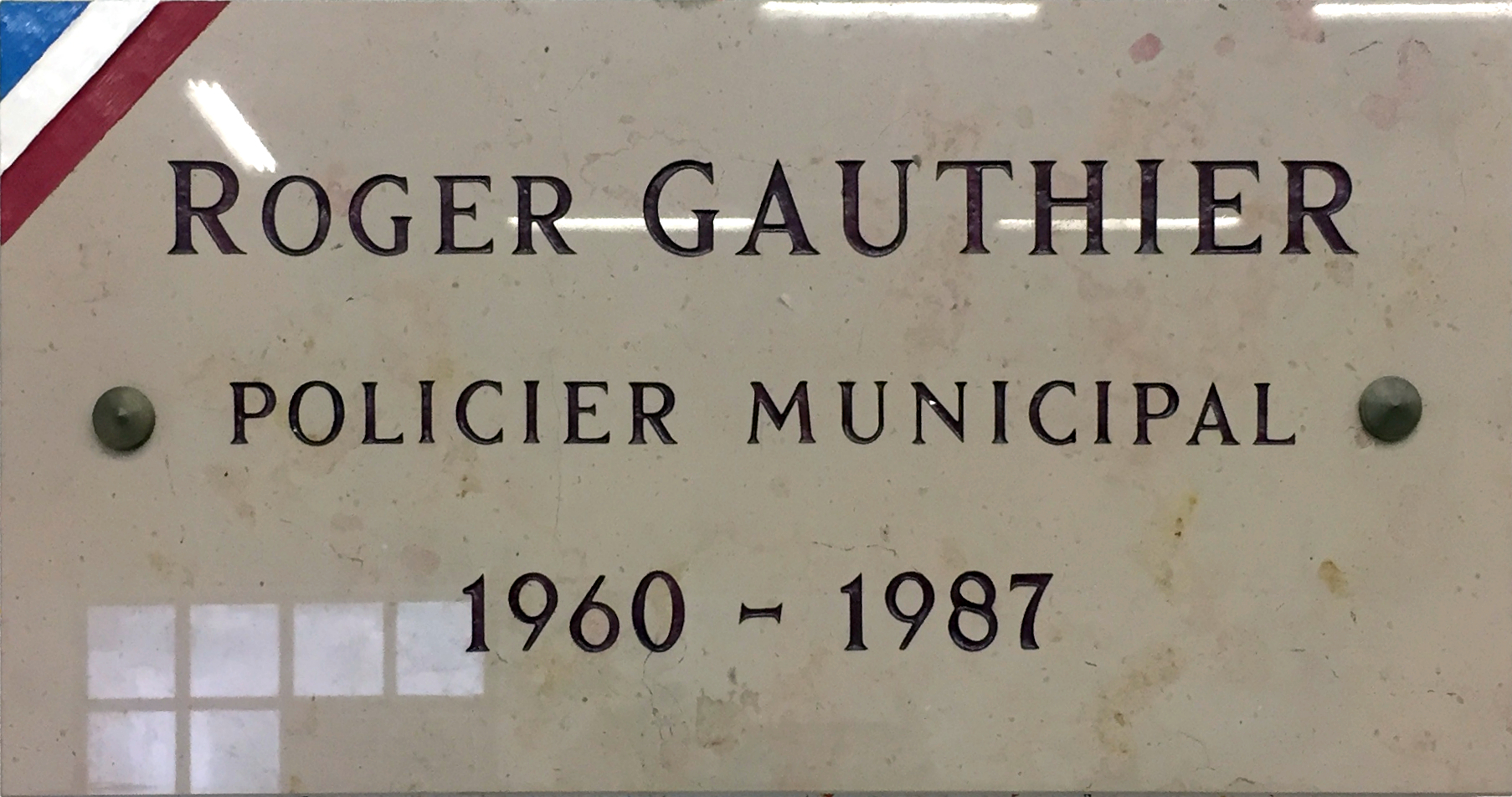 Plaque en hommage à Roger Gauthier sans la salle Roger-Gauthier à Charvieu-Chavagneux.